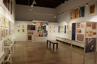 Einer von zwei Ausstellungsräumen